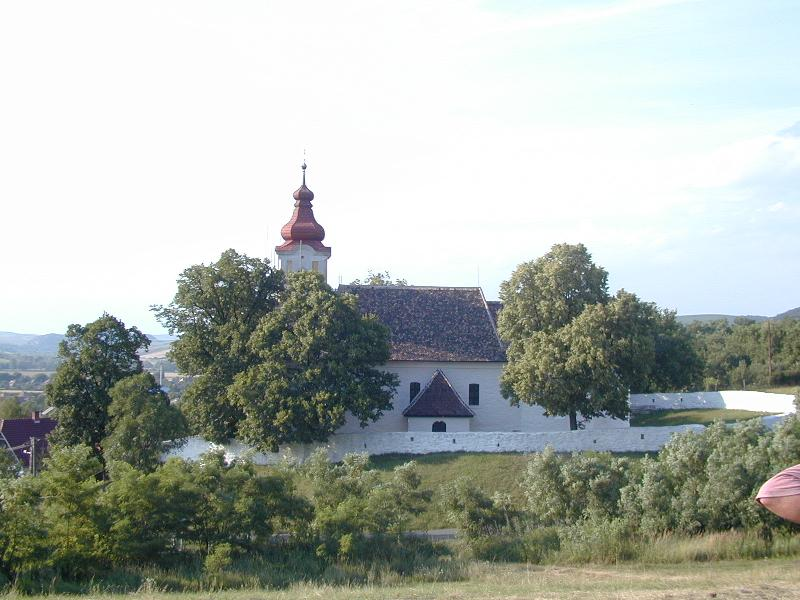 Tari Szent Mihály templom, Nógrád megye